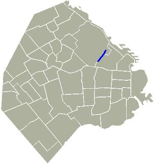 Avenida Coronel Díaz, Buenos Aires